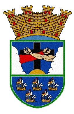 Escudo De Aguada Pauerto Rico